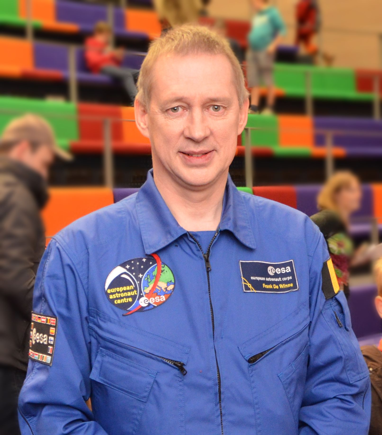 Frank De Winne tijdens een kinderlezing over ruimtevaart in Technopolis Mechelen